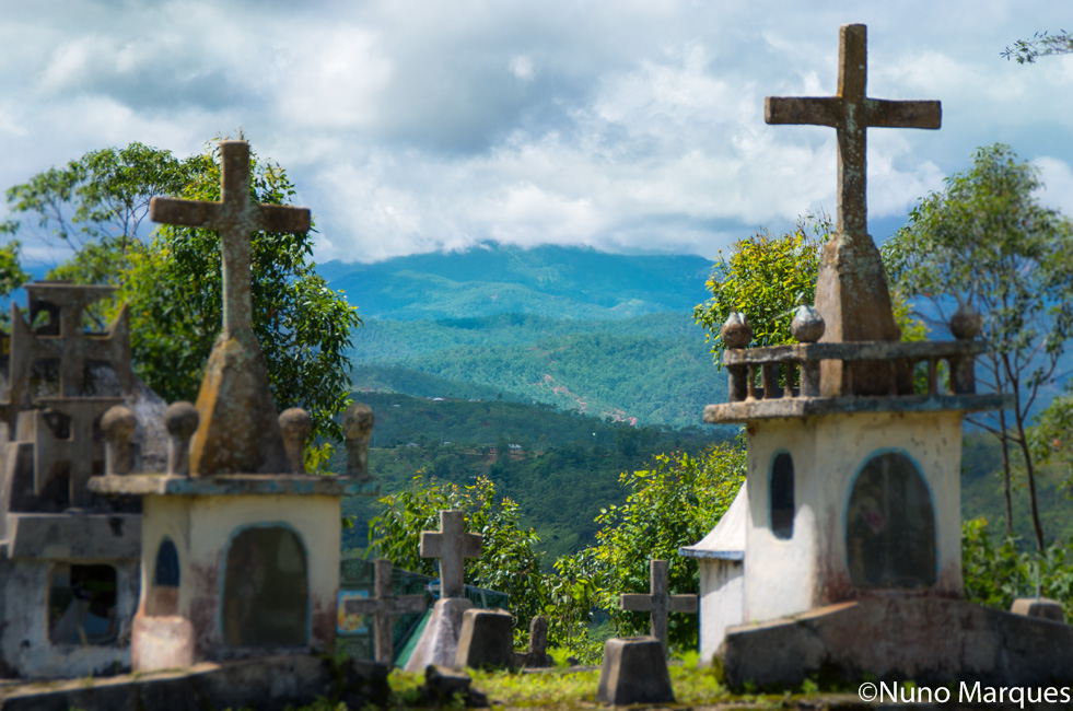 Grave, Railaco, Timor-Leste